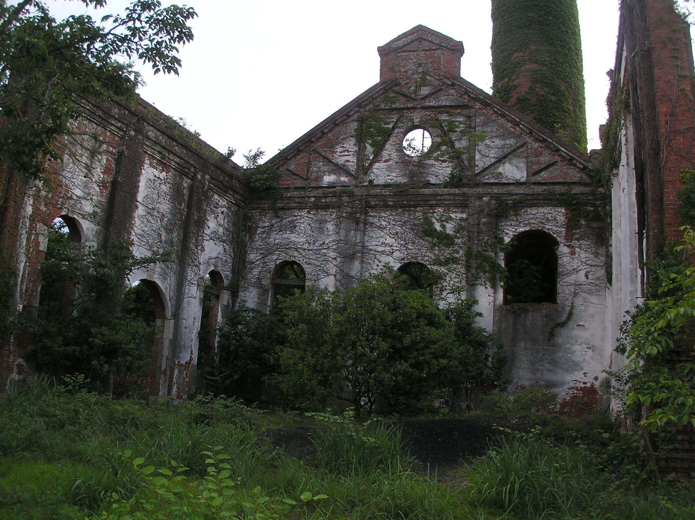 2004-05-22 Inujima,犬島